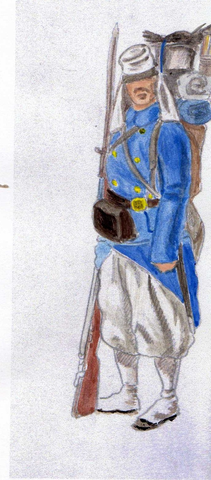 Légion belge. Grenadier en tenue de campagne. Mexique 1866.Template:Source? (d'après une planche de Patrice Courcelle)